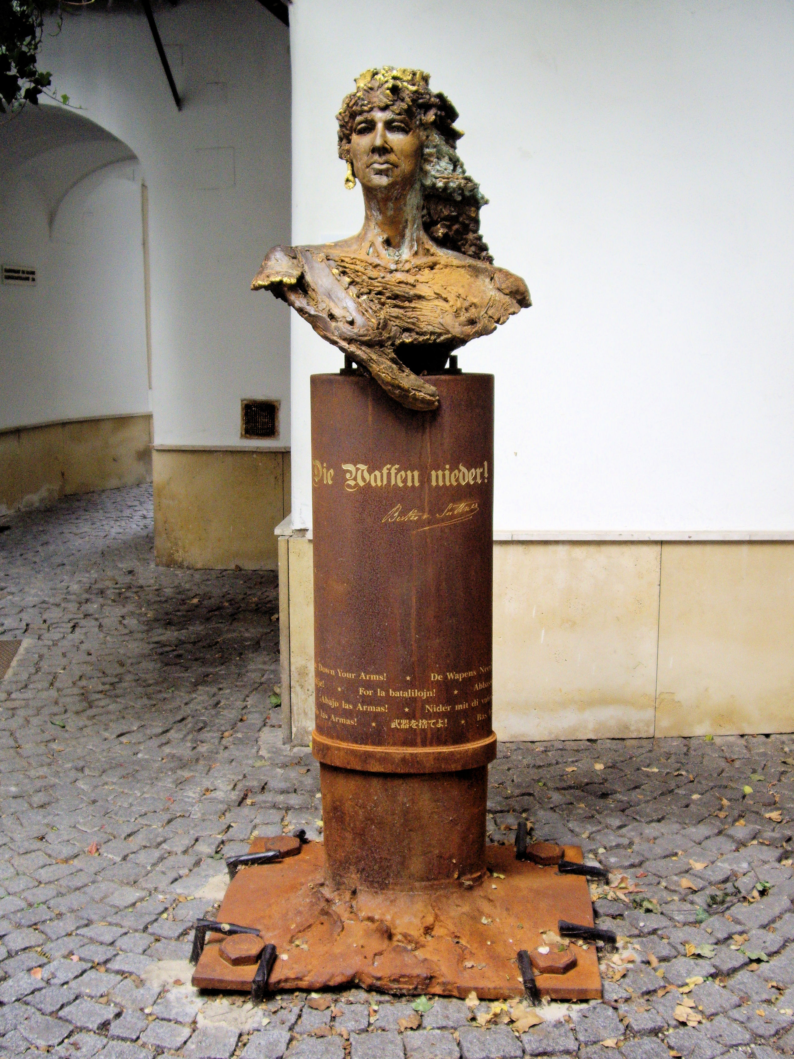 Skulpturaĵo de Bertha von Suttner en la korto de la Viena Pacomuzeo.